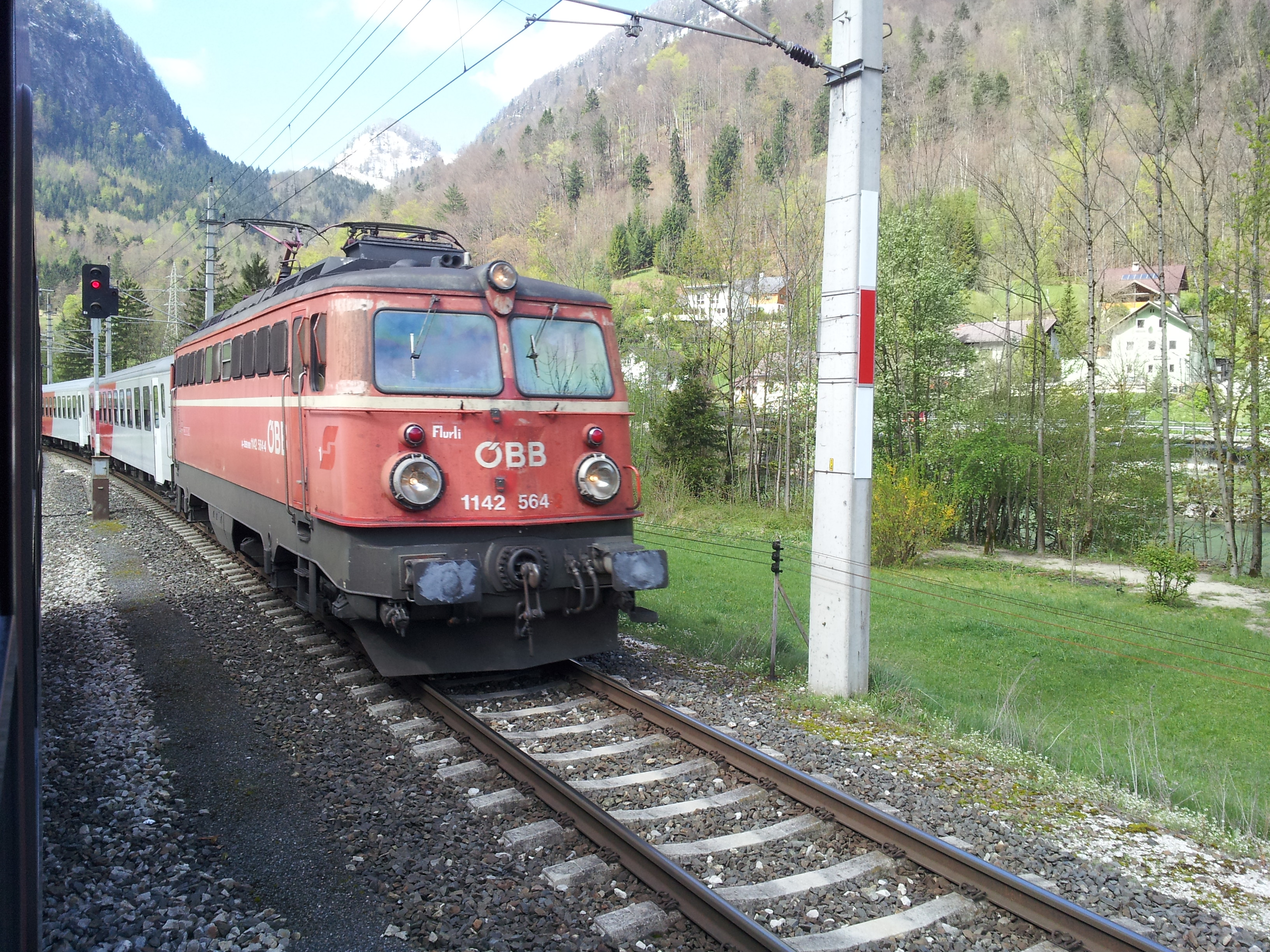 ÖBB 1142.564 / CityShuttle in Mitterweißenbach als REX 3415 nach Attnang-Puchheim